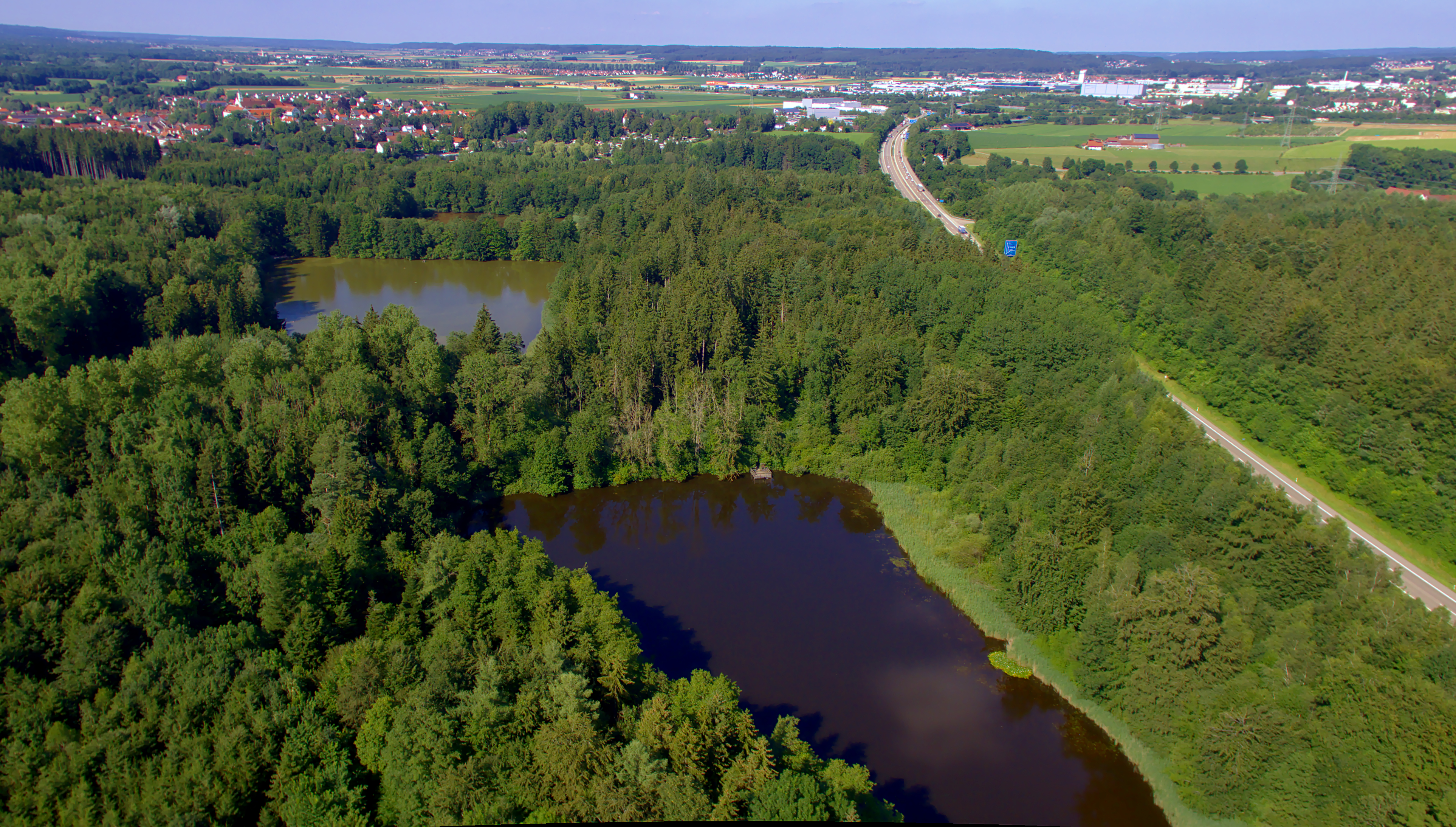 Buxheim 3. (hinten) und 4. (vorne) Weiher und Bundesautobahn 96